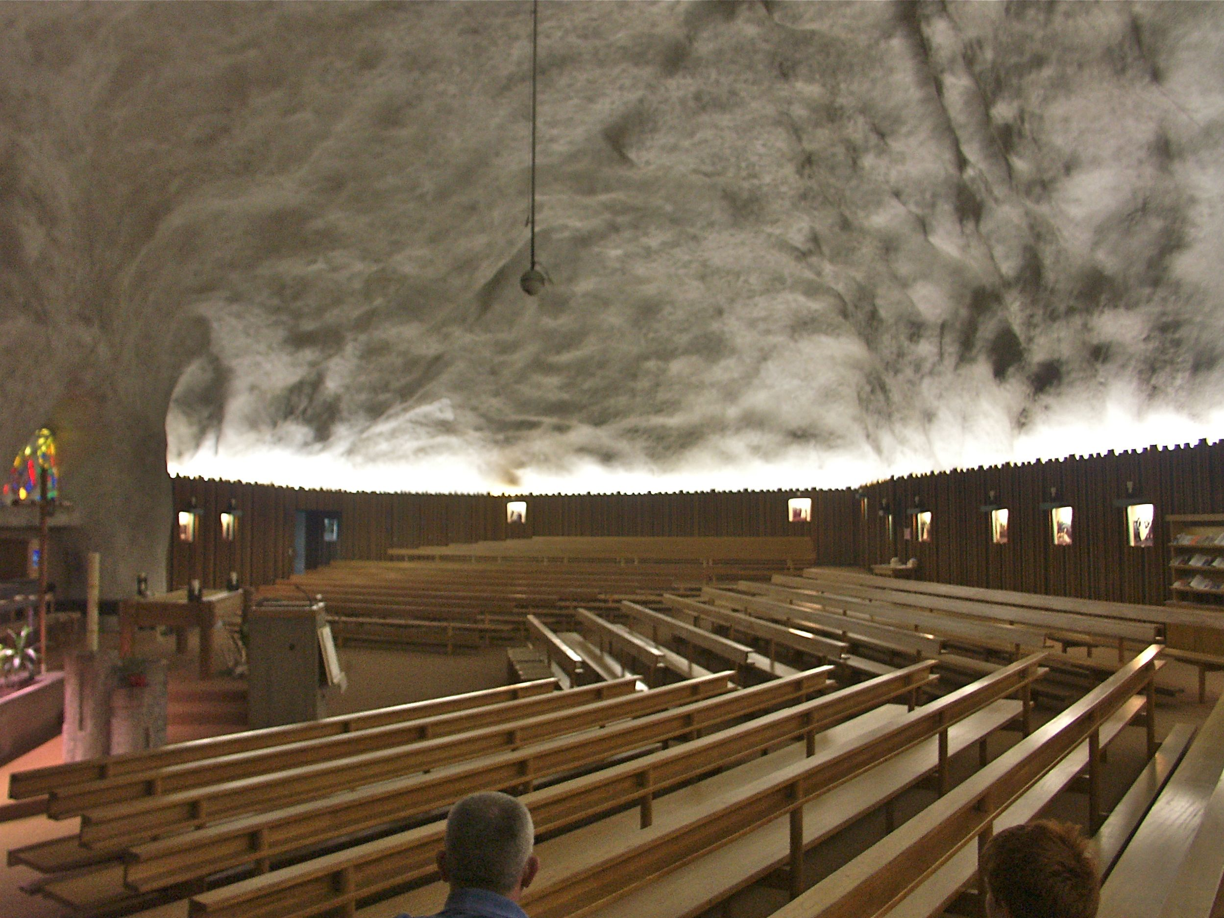 Felsenkirche in Raron VS, Schweiz